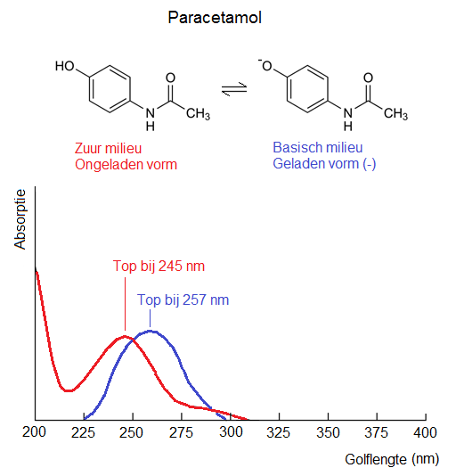 Paracetamol in waterig zuur en waterig basisch milieu geen een ander UV-spectrum. Dit noemen we een pH-shift.